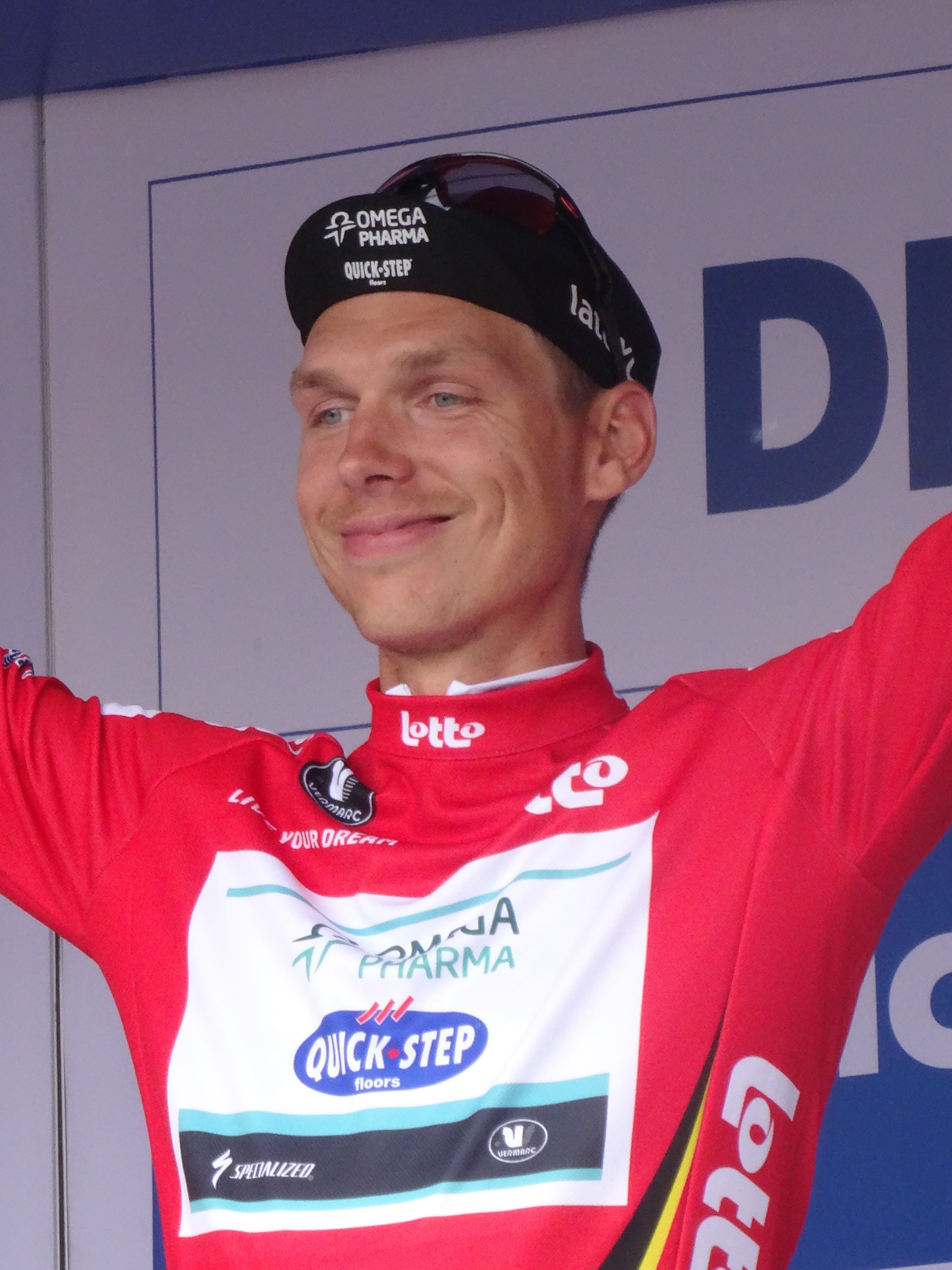 Reportage photographique réalisé le vendredi 30 mai à l'occasion du contre-la-montre individuel de la troisième étape du Tour de Belgique 2014 à Dixmude, Belgique.